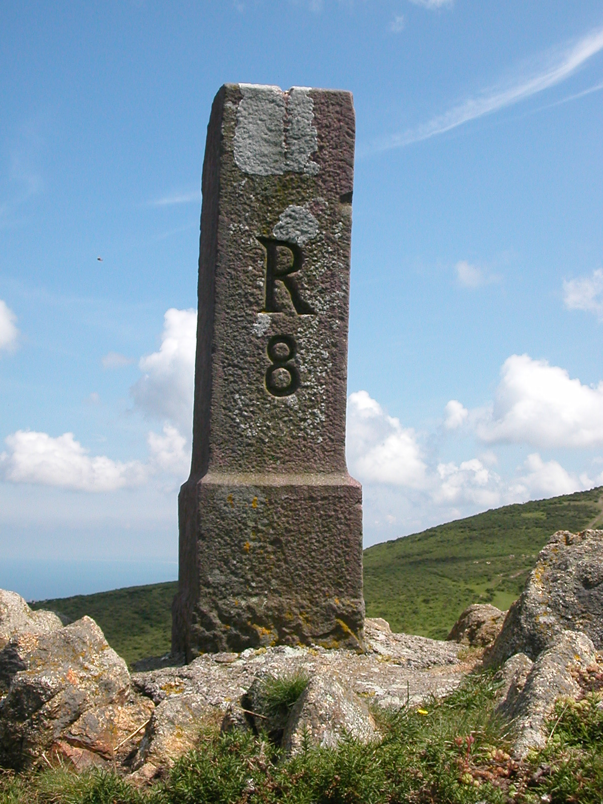 Frontière franco-espagnole : borne n°8, entre les communes de Bera-Vera de Bidasoa (E) et Biriatu-Biriatou (F)